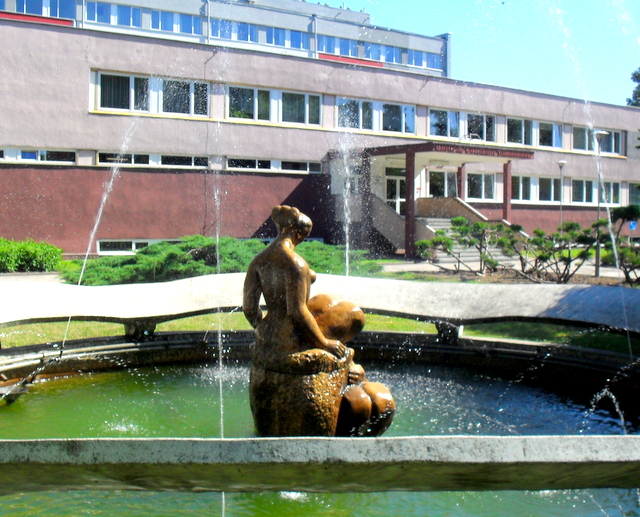 Wrocław, Instytut Niskich Temperatur i Badań Strukturalnych przy ul. Okólnej